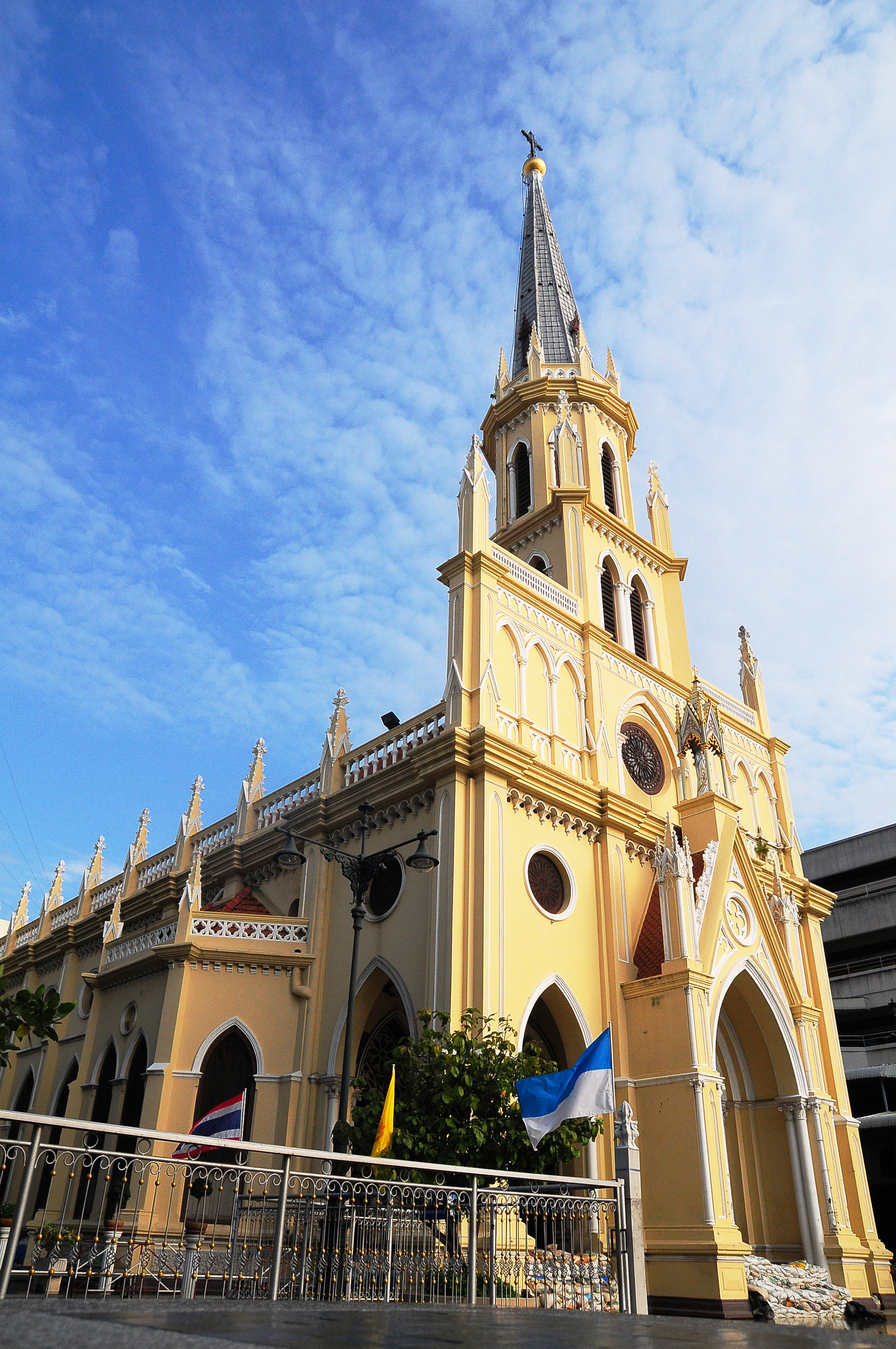 วัดแม่พระลูกประคำ (กาลหว่าร์)